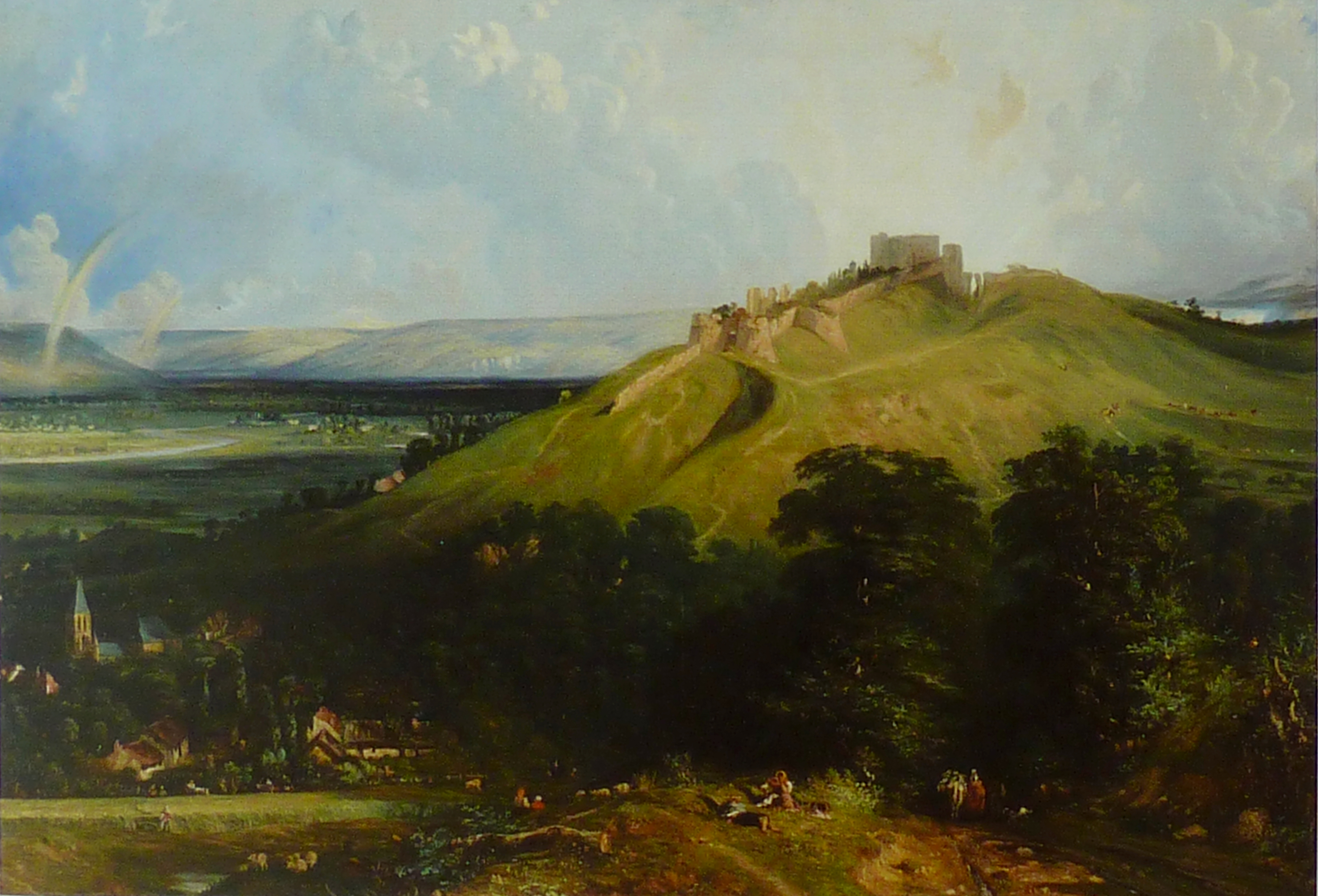 Le château d'Arques-la-Bataille (Seine-Maritime). Huile sur toile de Paul Huet, 114x165 cm. 1838-1839. Musée des Beaux-Arts d'Orléans.